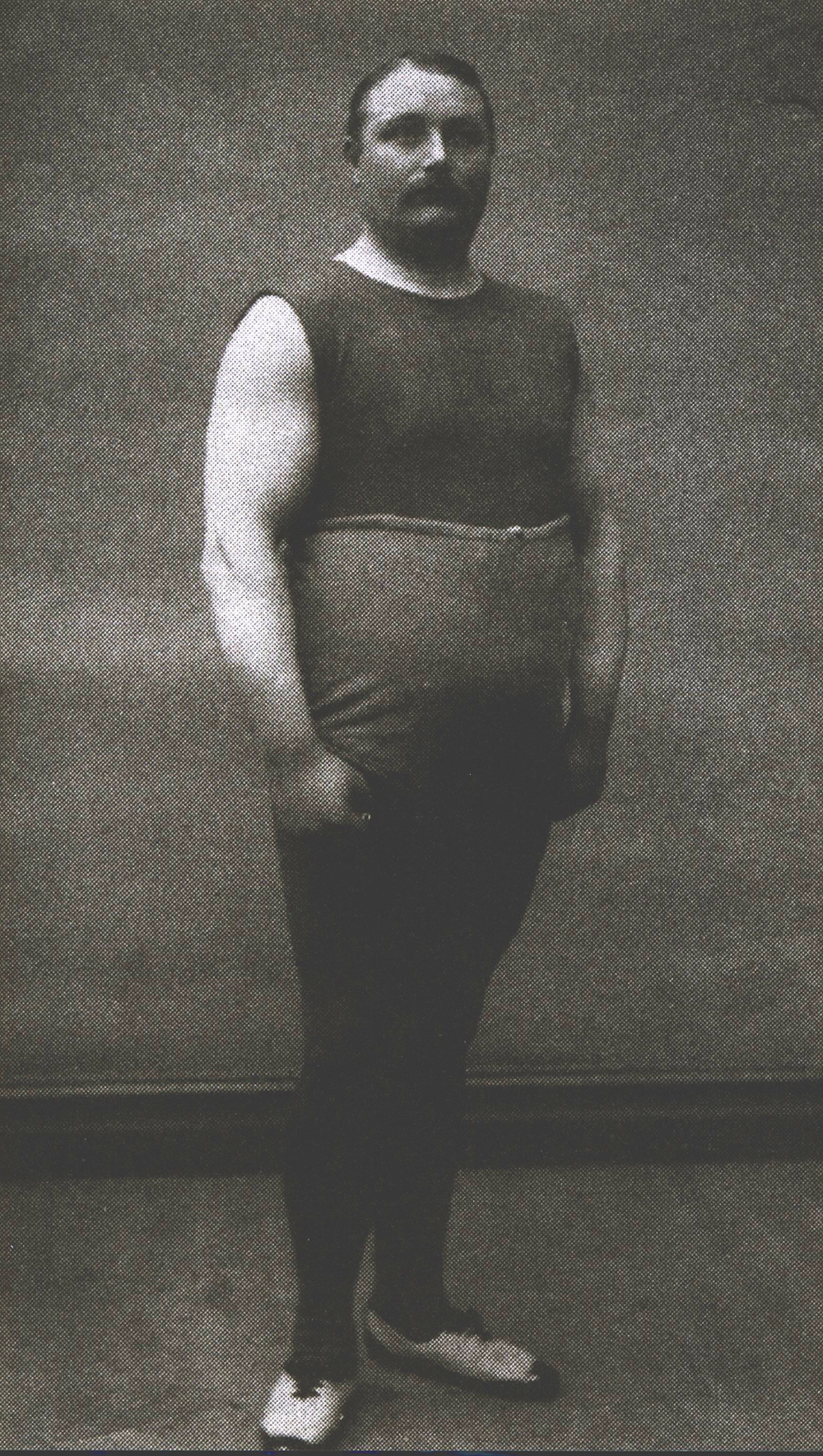 Carl "Våran" Gustafsson